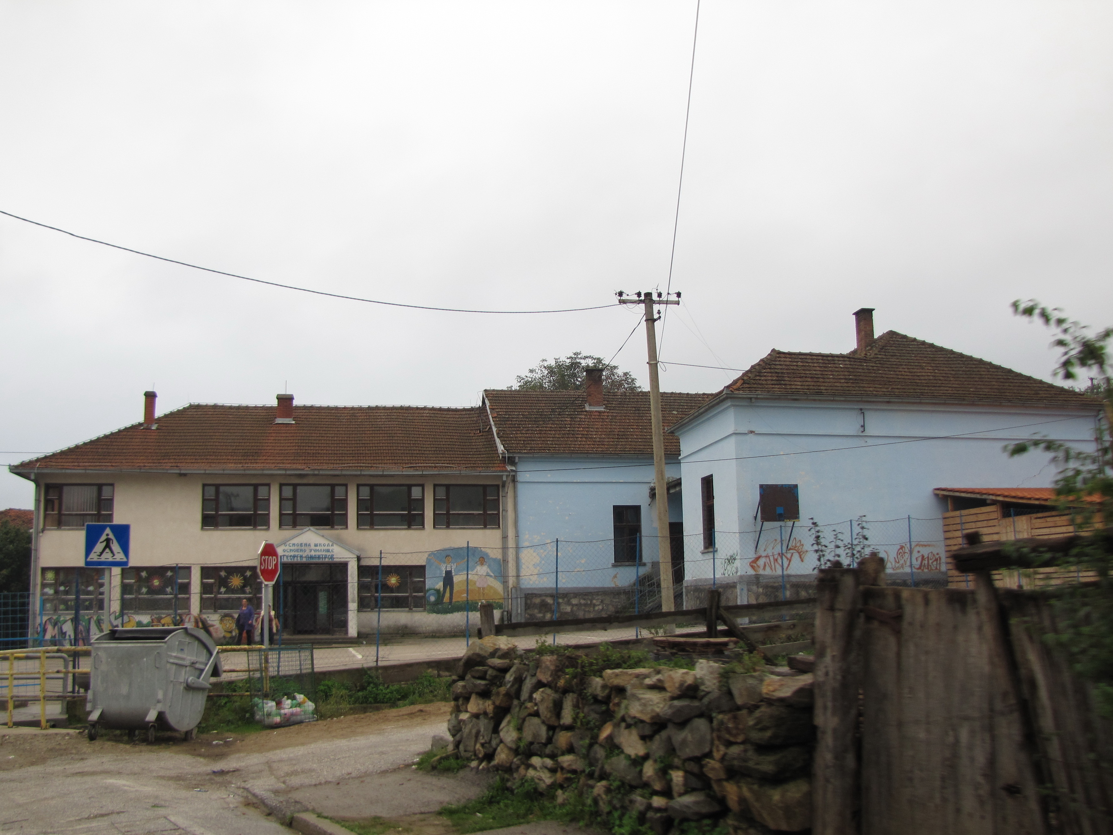 Основна школа у селу Рајчиловци (Босилеград).